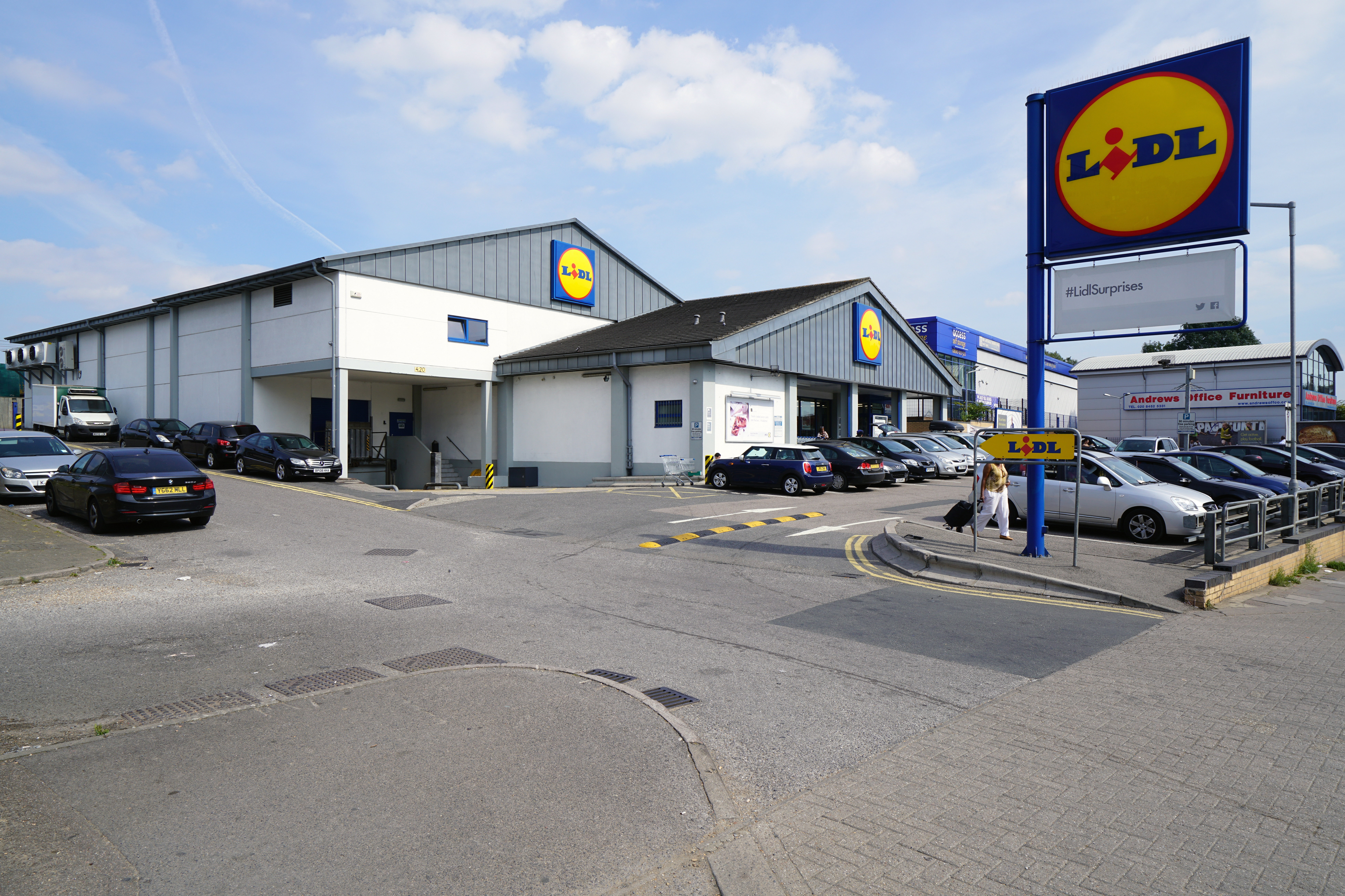 Eine Lidl-Filiale in London (Stadtbezirk: London Borough of Barnet) an der Edgware Road im Vereinigten Königreich.